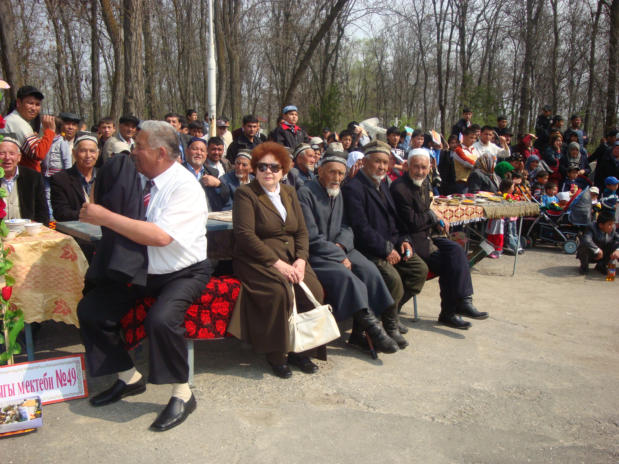 Навруз из Жалалабадда 2010